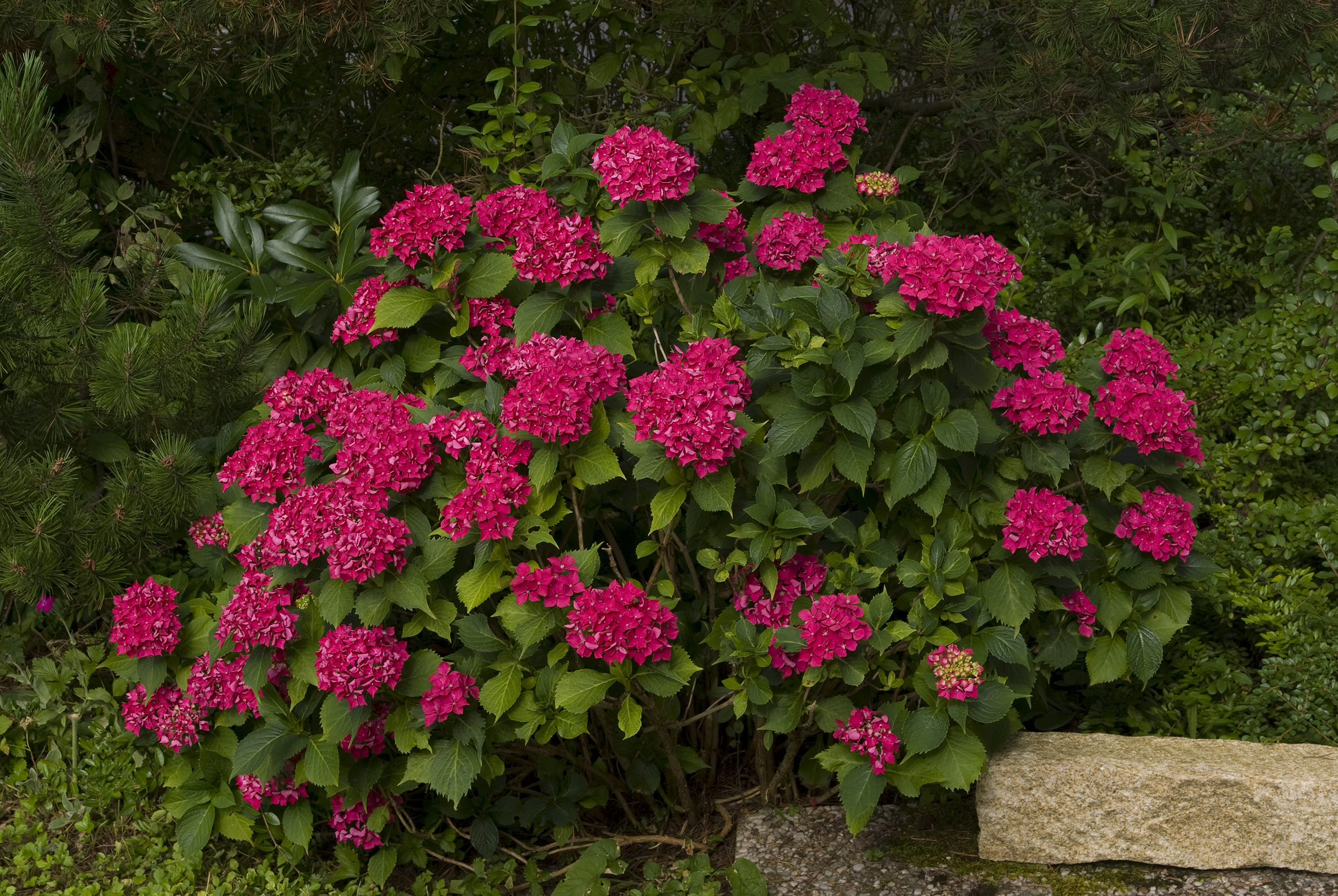 Gartenhortensie in der Gesamtansicht.